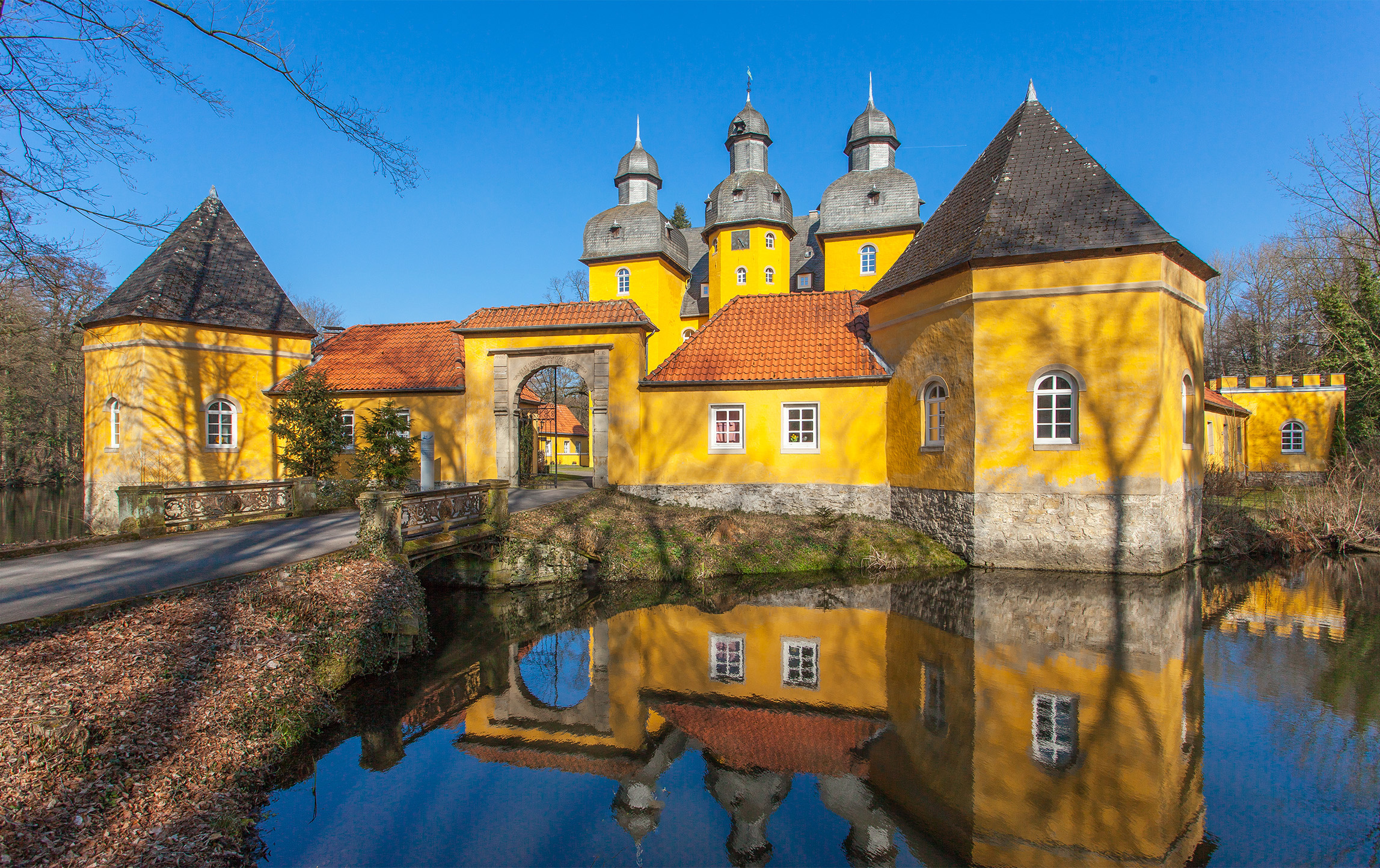 Schloss Holte in Schloß Holte-Stukenbrock, Kreis Gütersloh (Ansicht von Süden)